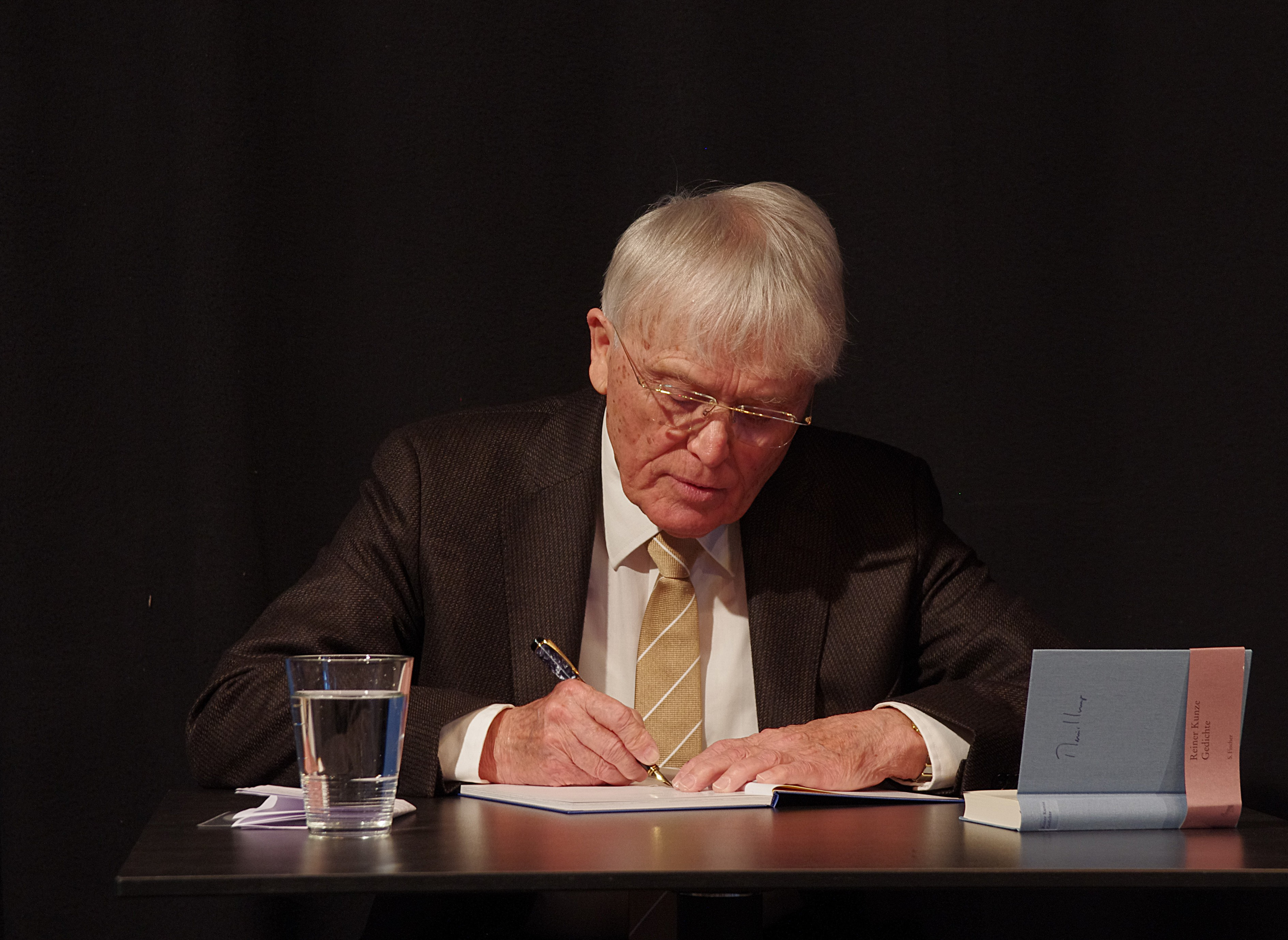 Reiner Kunze auf einer von Schorndorfer Kulturforum und Stadtbücherei veranstalteten Lesung im Jazzclub Session 88, Schorndorf (Baden-Württemberg, Deutschland)